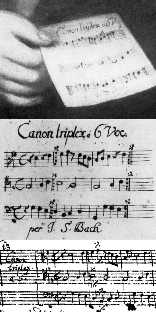 J. S. Bach: Canon triplex in drei Fassungen 1. auf dem Porträt von Haußmann 2. Im Originaldruck 3. in Bachs Handexemplar von BWV 988, Nr. 13 der 14 Kanons